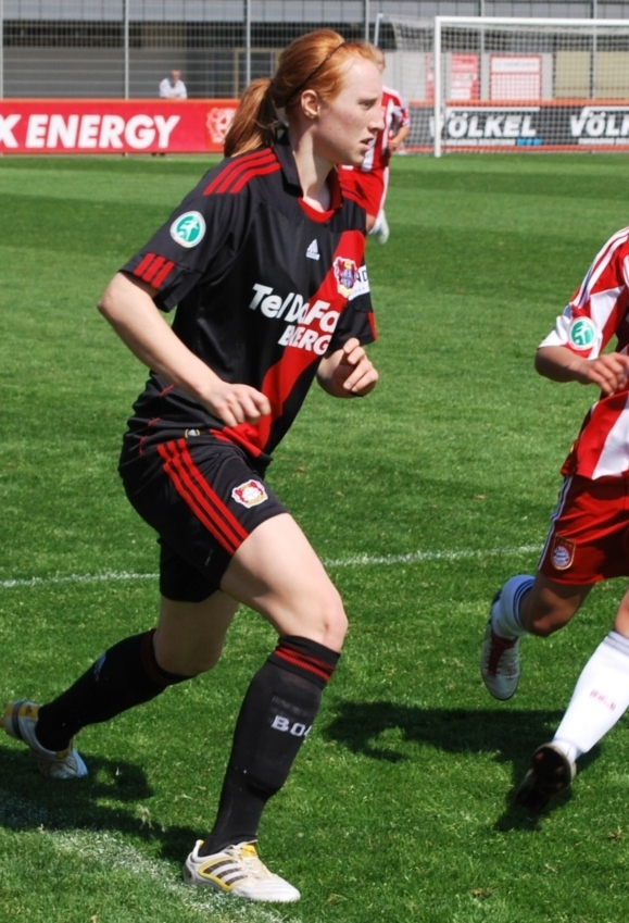 Teresa Tüllmann im Bundesliga-Cup-Spiel gegen den FC Bayern München am 25. April 2011.